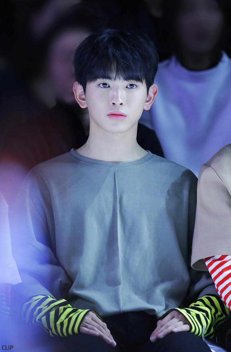 171018_헤라 서울패션위크 슈퍼콤마비